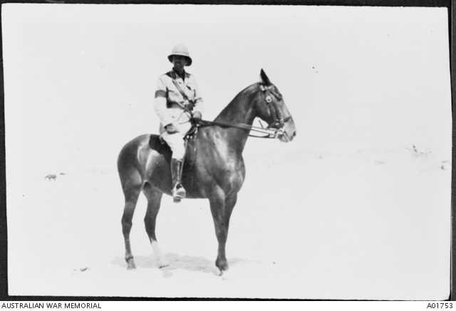 מייג'ור גנרל הנרי הודג'סון על סוסו בחאן יונס